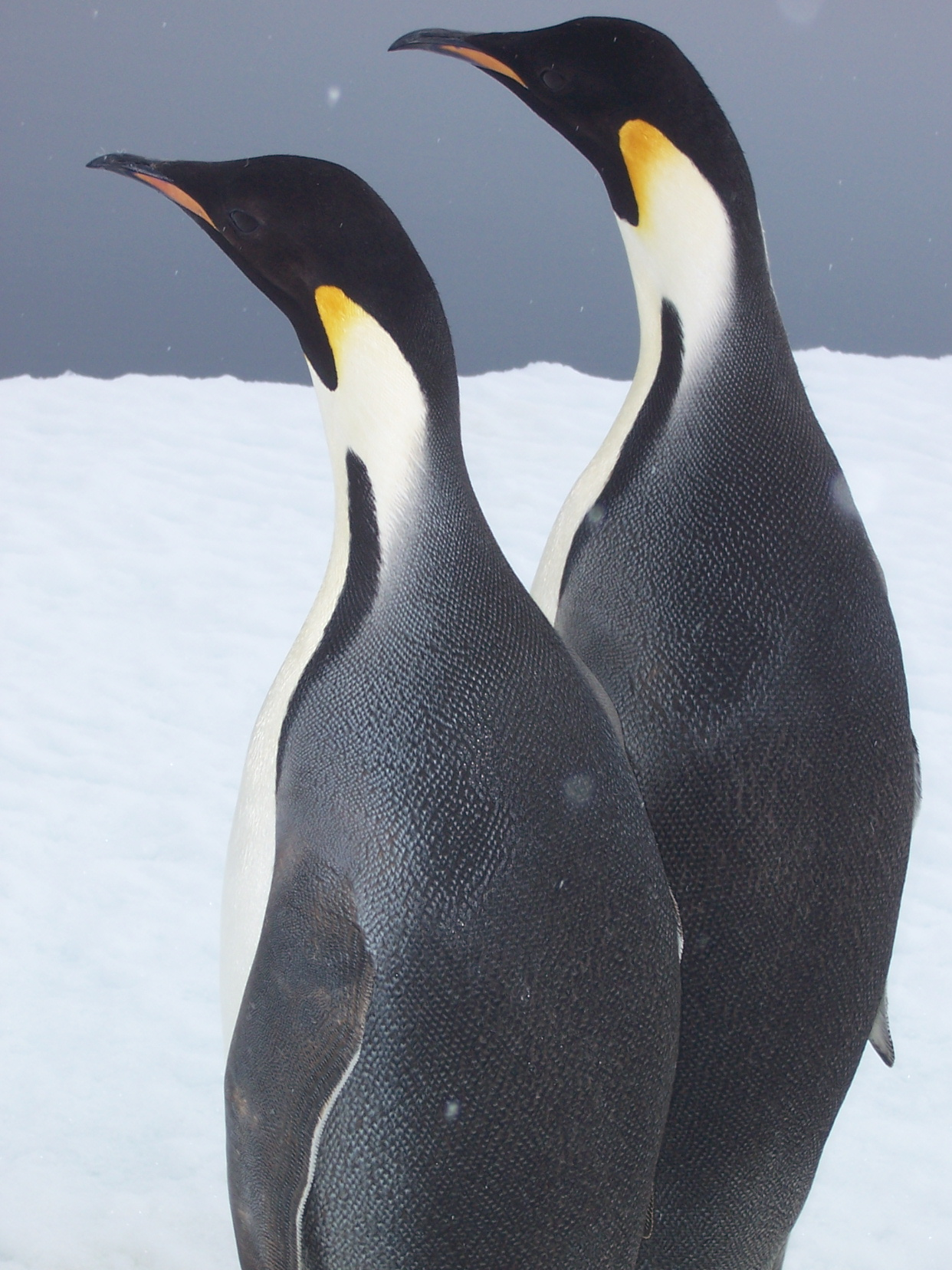 Couple de manchots empereurs. Photo prise à coté de la base française Dumont d'Urville en Antarctique.